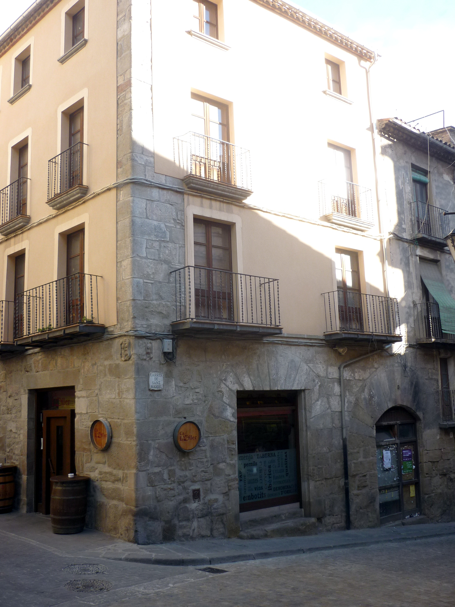 Cal Melitón (Solsona)